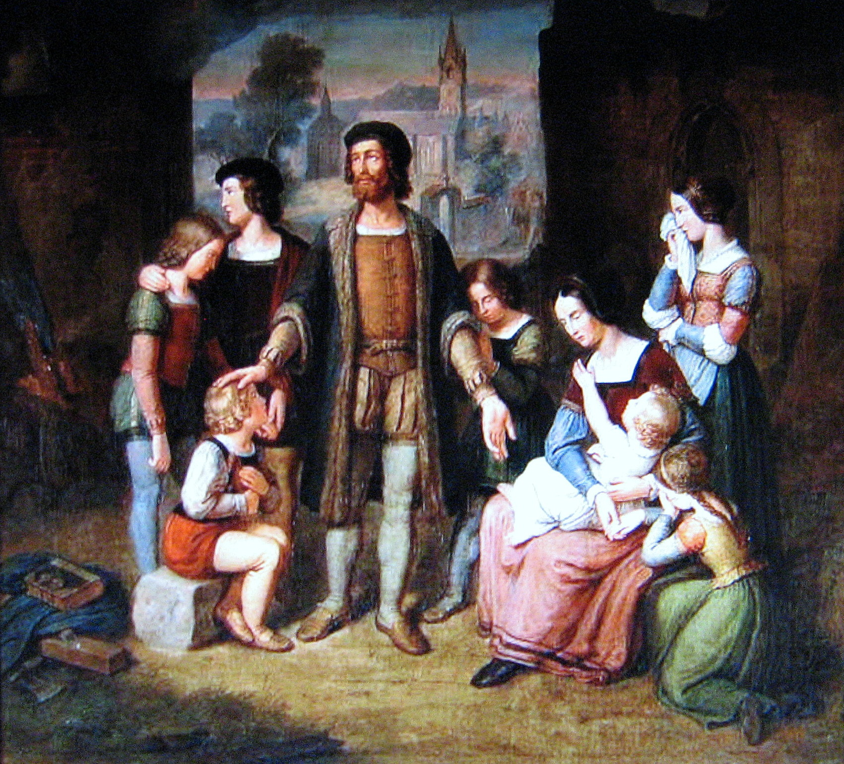 Historienbild in der Ruine stehende Familie eines Edelmannes, ein Balken brennt noch.